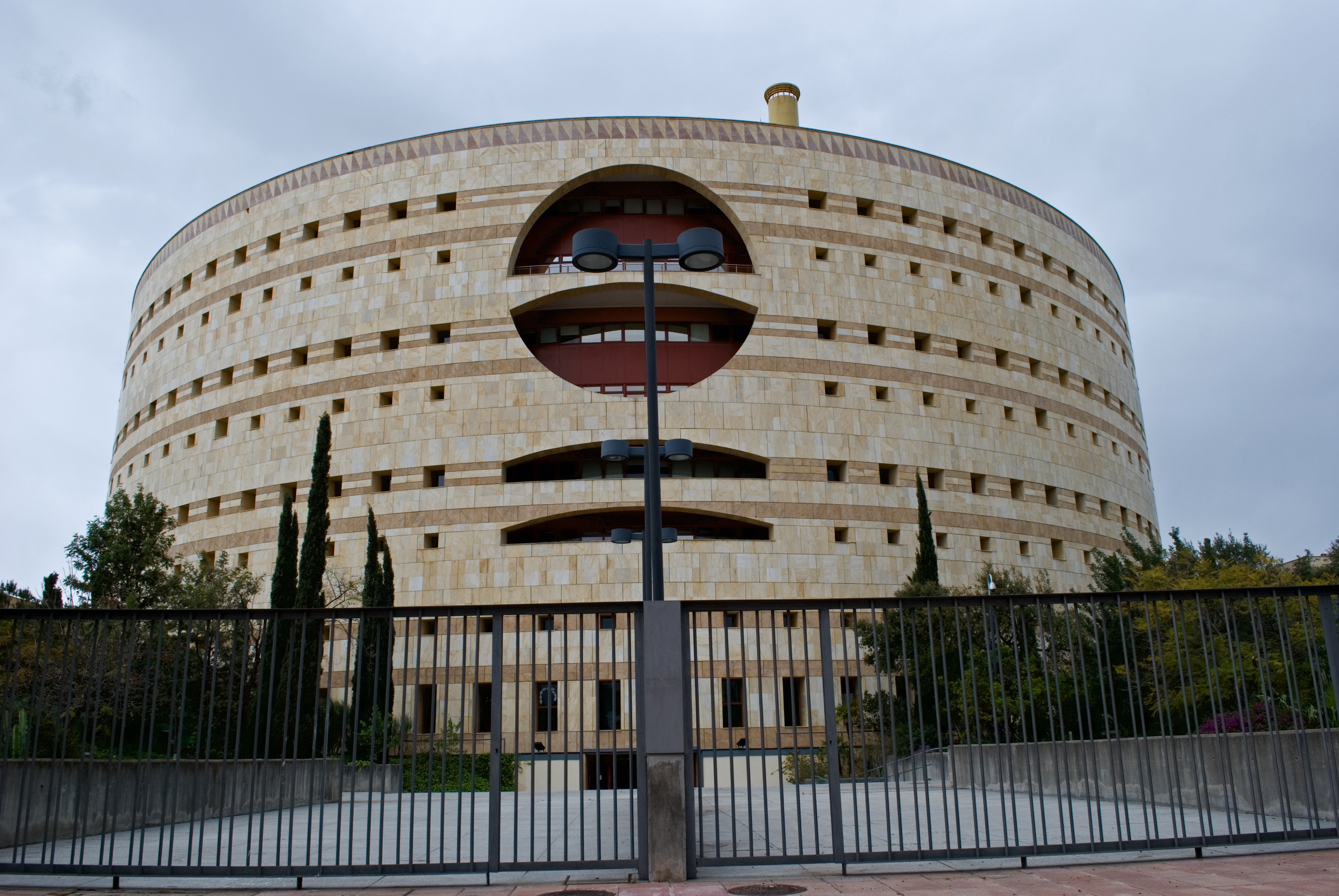 Edificio Torre Triana, arquitecto Francisco Javier Sáenz de Oiza. Sede de Junta de Andalucia